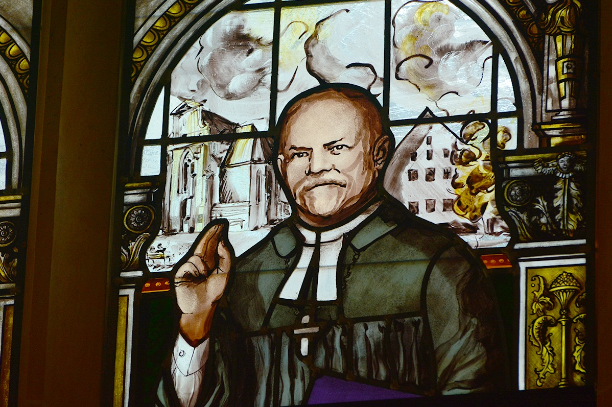 Witraże kościoła św. Krzysztofa we Wrocławiu